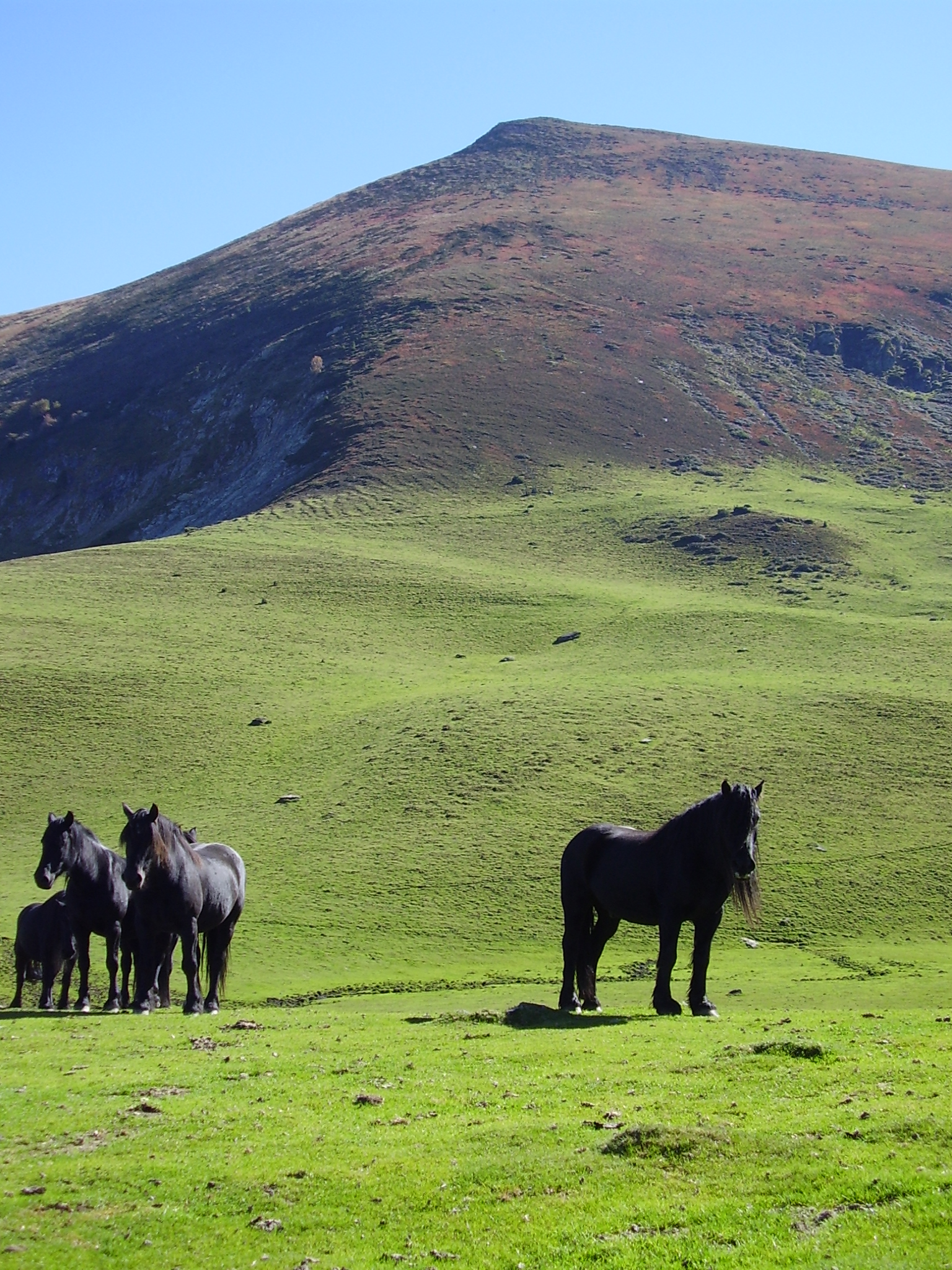 Chevaux de trait ariègeois Mérens près du pic de la Calabasse.